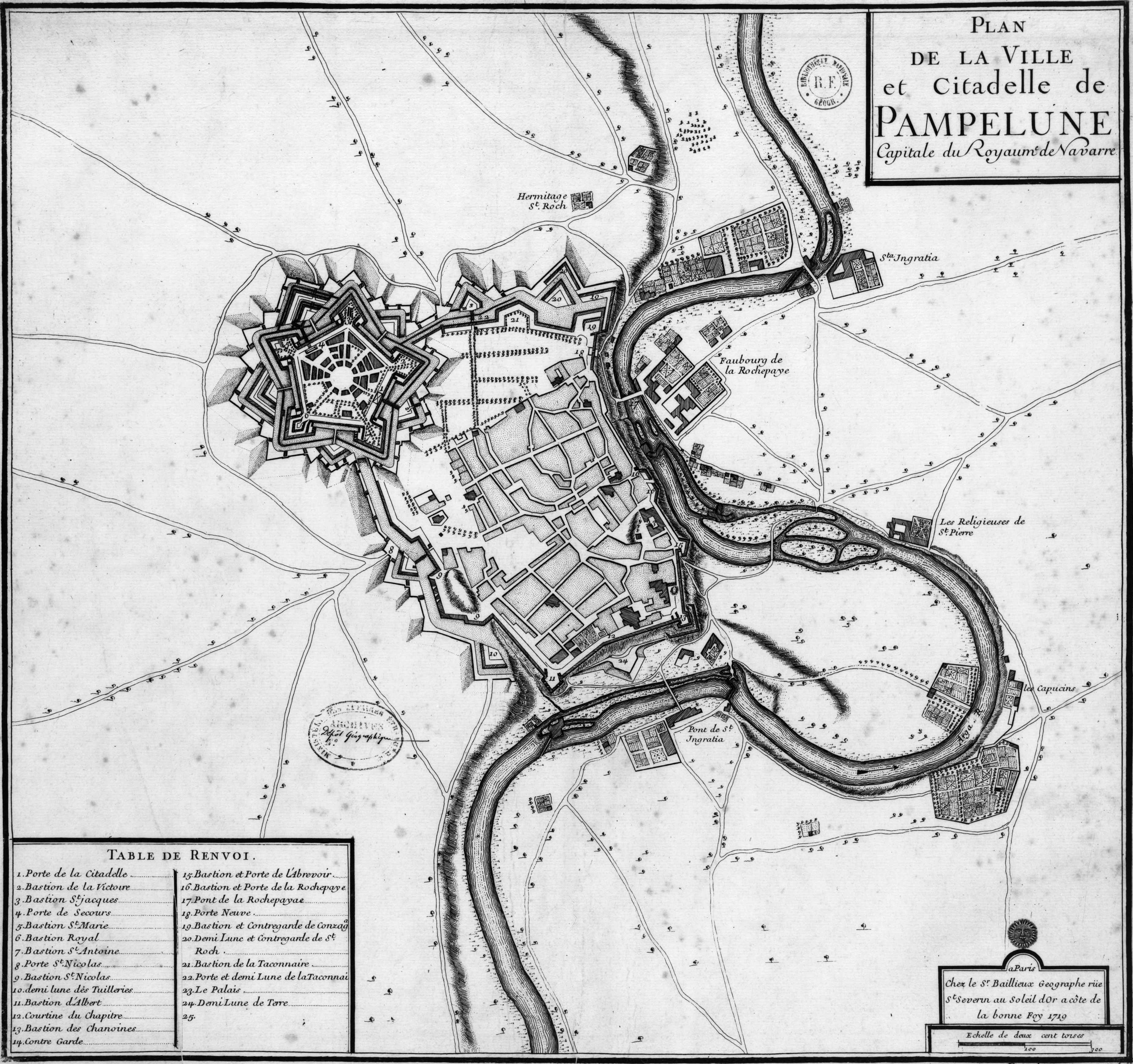 Carte de Pampelune en 1719